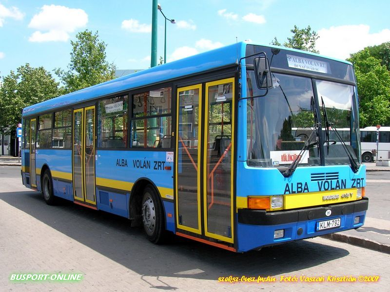 Dízelmotorosra átalakított Ikarus 415T trolibusz Dunaújvárosban